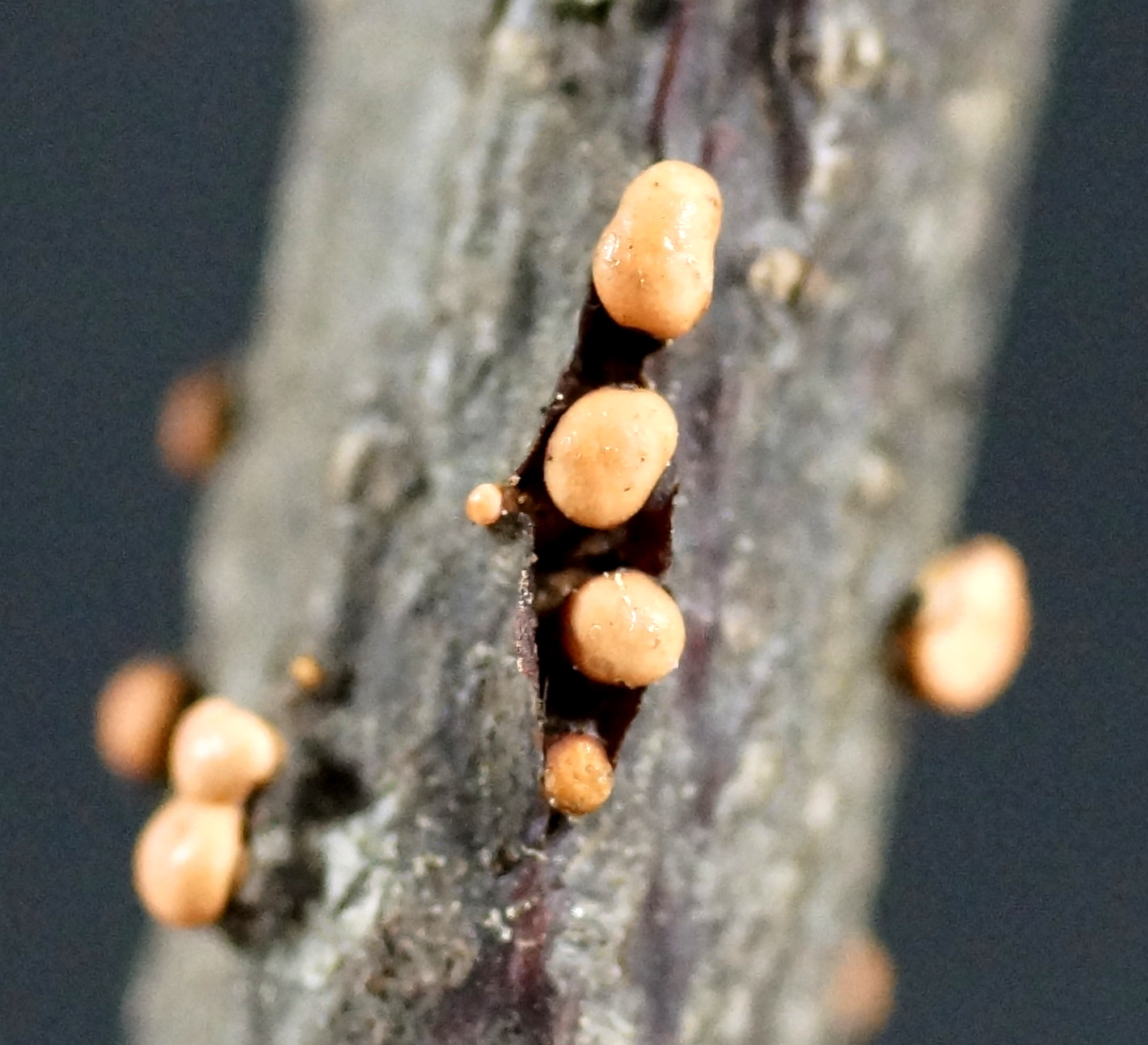 Zinnoberroter Pustelpilz, Nectriaceae, Deutschland, Bayern, Oberfranken, Selbitz Photo: U.Schmidt, 8.X.2012